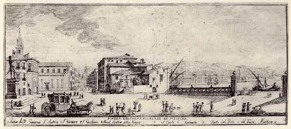 Francesco Sicuro, Piazza del Palazzo Reale a Messina. Incisione del sec. XVII.